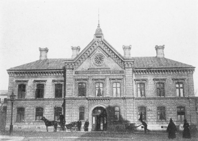 Allmänna försörjningsinrättningen, Fleminggatan 22, Grubbens, porthus, huvudentrén till området, arkitekt Per Emanuel Werming. Byggnadsår 1880, byggherre Stockholms byggnadskontor, byggmästare okänd. F 33656